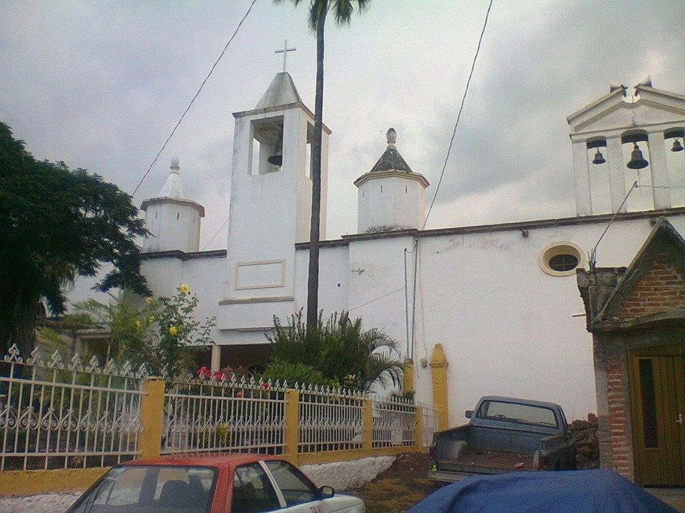 Capilla de Las Fuentes, Ecuandureo, Michoacan